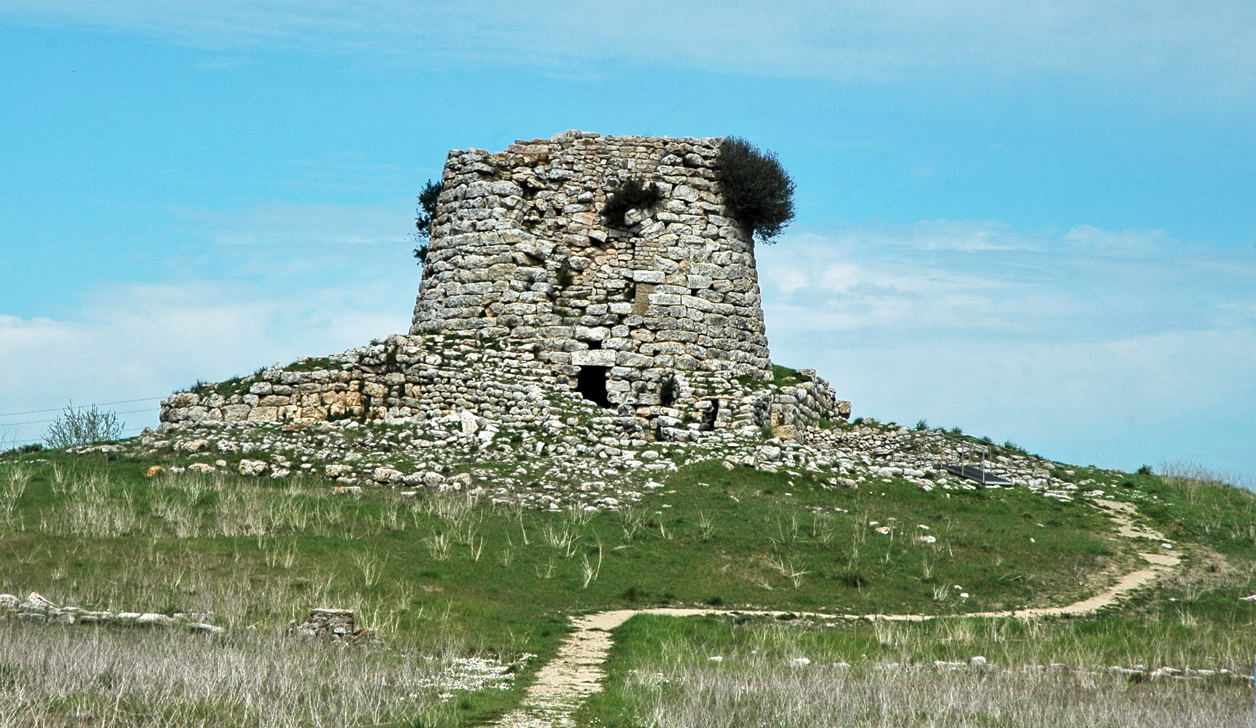 Nuraghe Is Paras - MIBAC This is a photo of a monument which is part of cultural heritage of Italy.